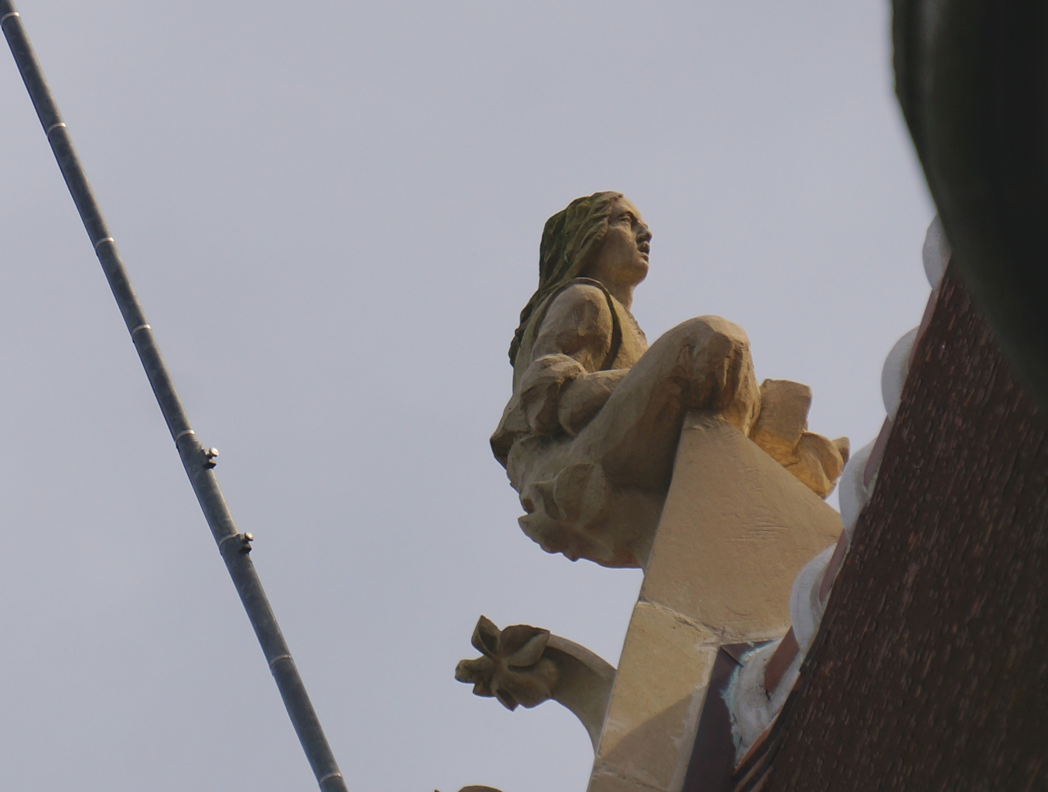 vue du Palais épiscopal de Laon.